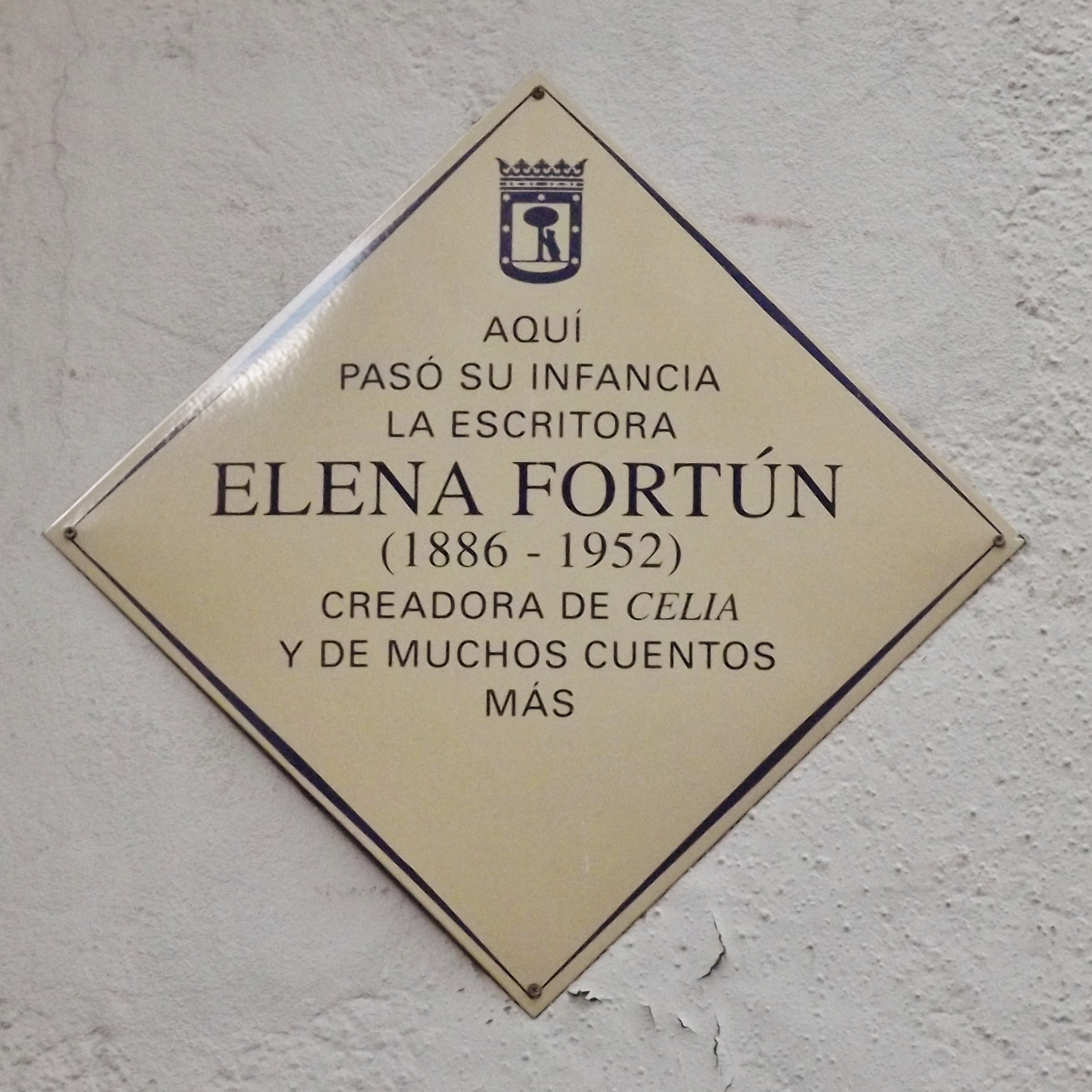 Placa del Ayuntamiento de Madrid en la calle Huertas número 47,[1] donde pasó su infancia la escritora Elena Fortún (1886-1952), creadora de Celia y de muchos cuentos más.